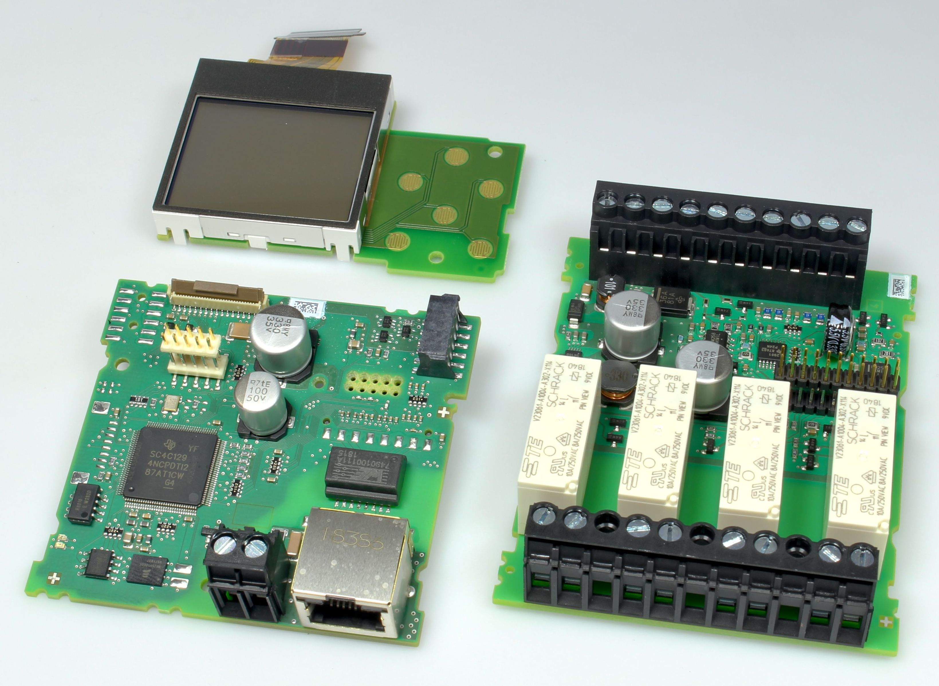 Siemens LOGO! 8 12/24 RCE